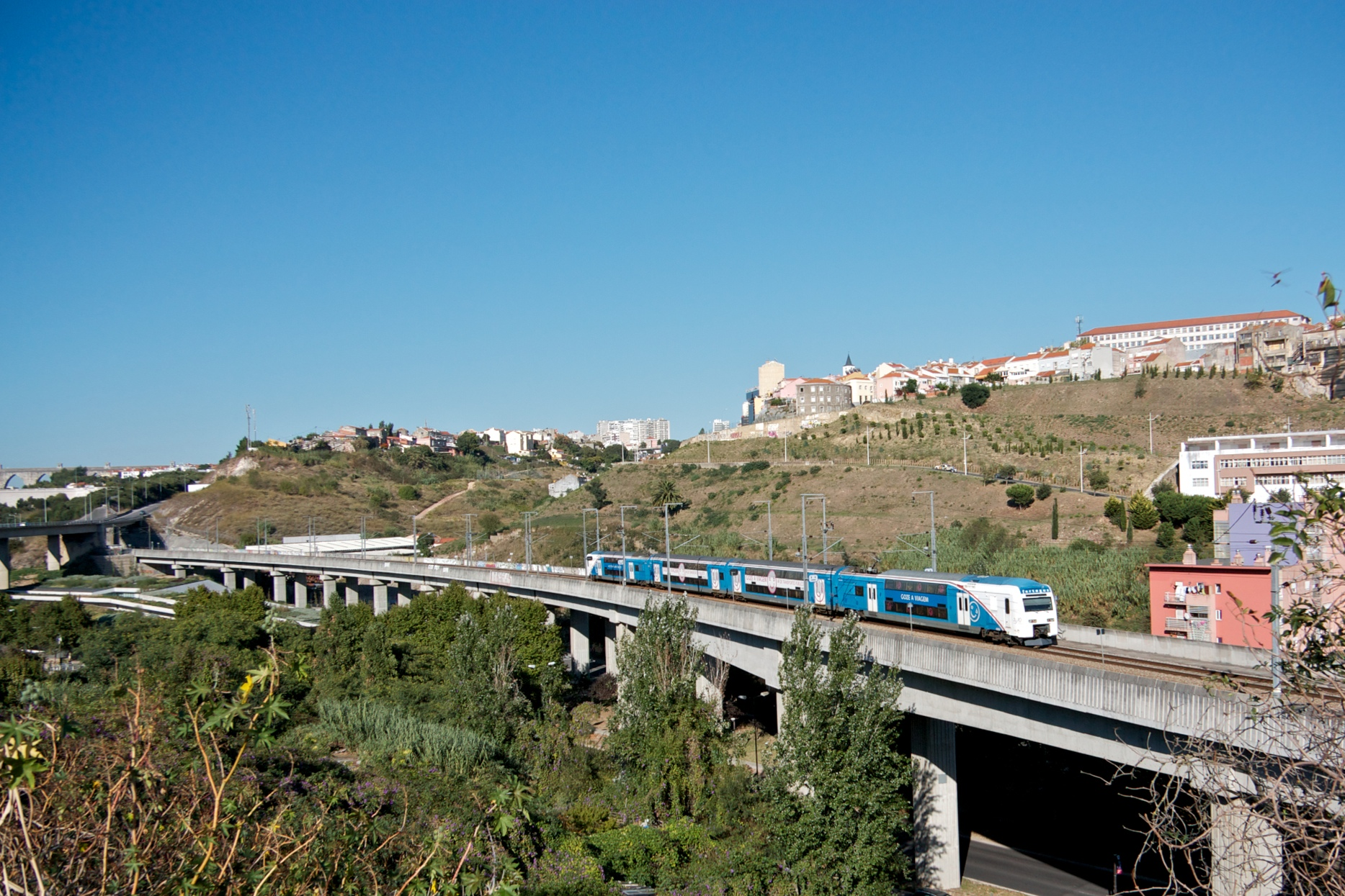 Tipo: Comboio Suburbano 14081 [Roma • Areeiro - Coina] Local: antes da Estação de Alvito–A [Linha do Sul , PK 1] Data e hora: 13 de Setembro de 2011 [17h23] Material: Automotora 3504 [Unidade Quádrupla Eléctrica] esta fotografia foi publicada na plataforma Trainspo .